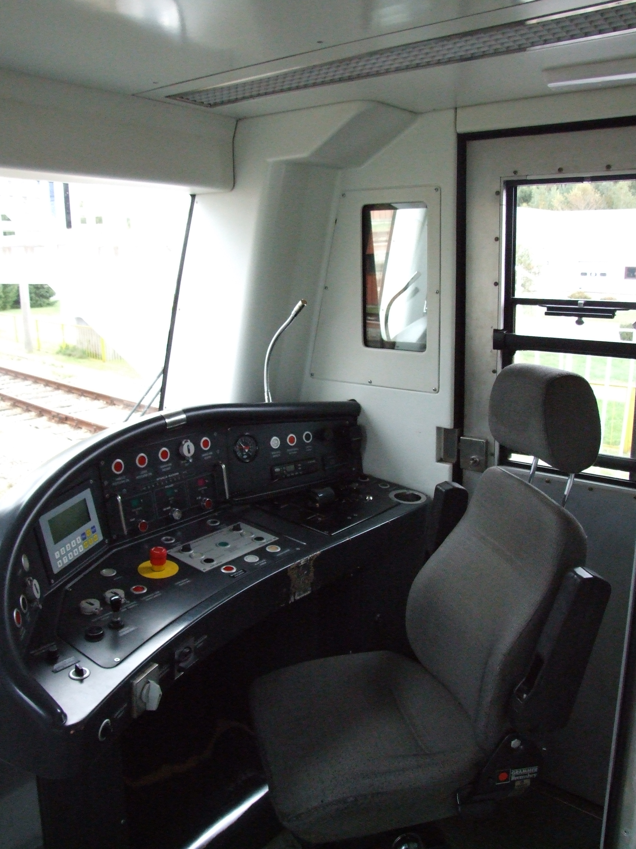 Kabina Maszynisty w składach Alshtom METROPOLIS. Widok na pulpit sterowniczy.